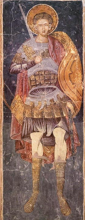 Фрэска Месцазнаходжанне Музей ікон (Muzeum Ikon), Супрасль